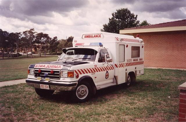 Ford F250 ambulance circa 1996